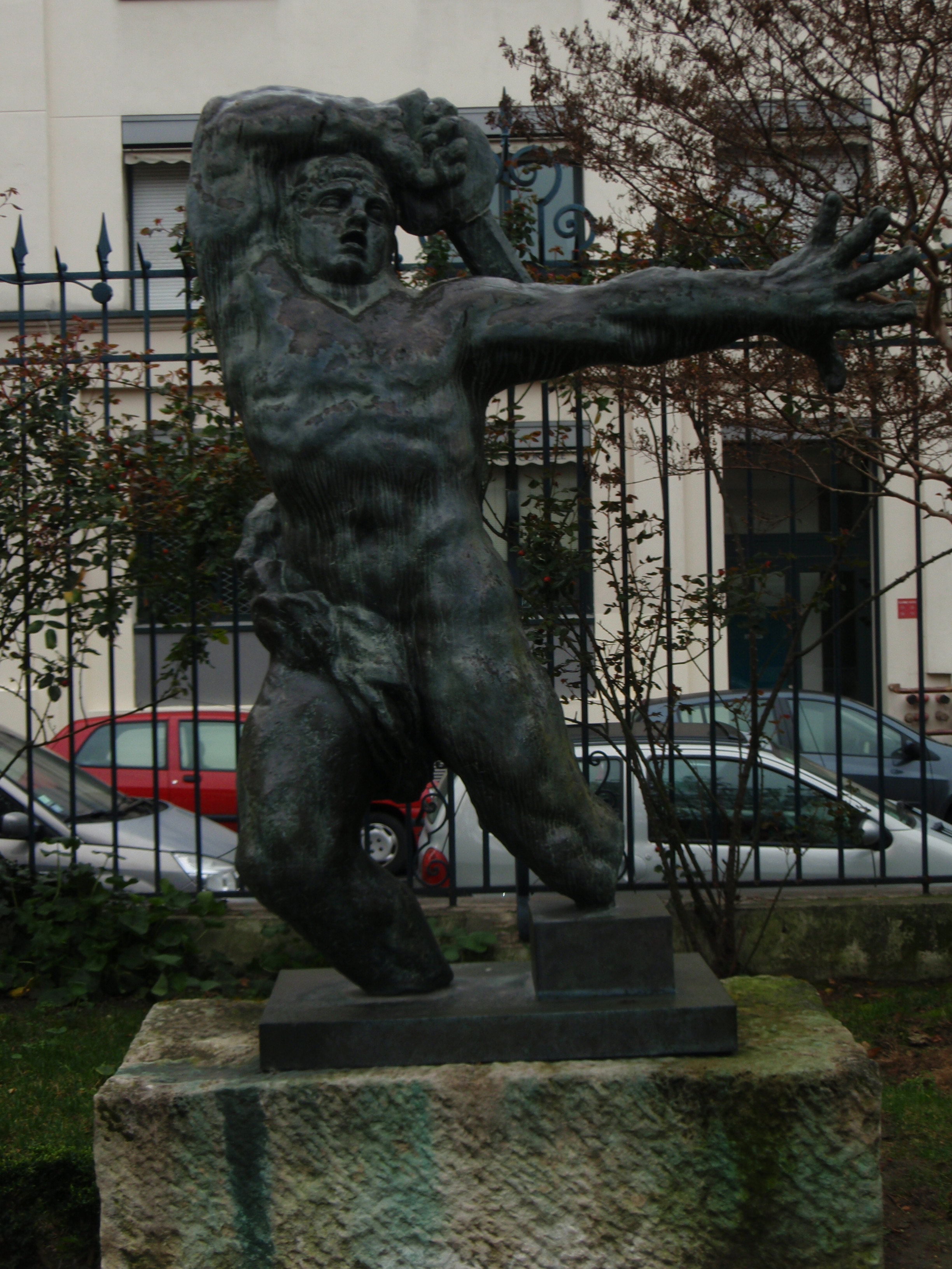 étude de 1898 pour le Monument aux Morts de Montauban.